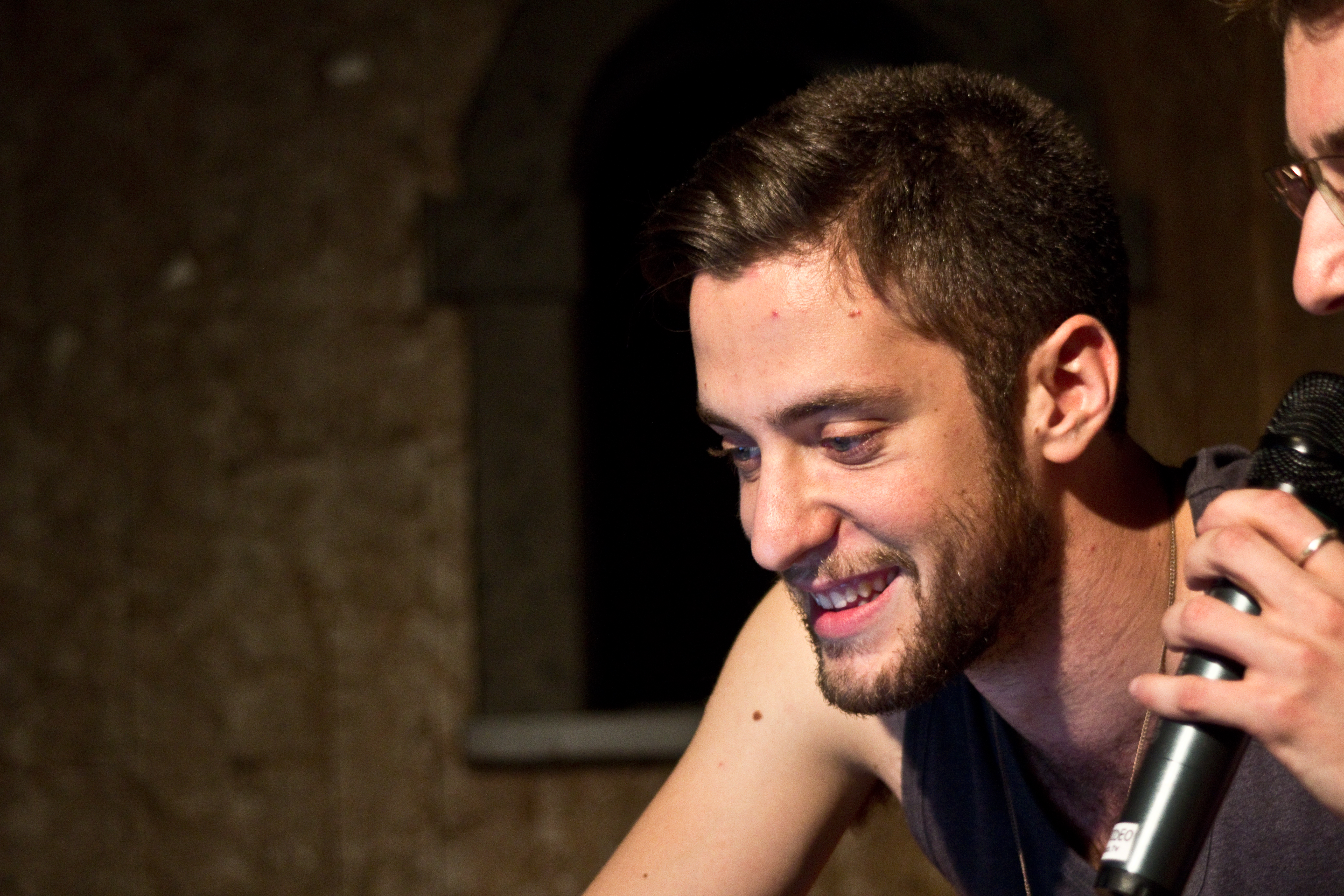 Secret Show di Freaks al Blackout di Roma. Giampaolo Speziale (About Wayne)